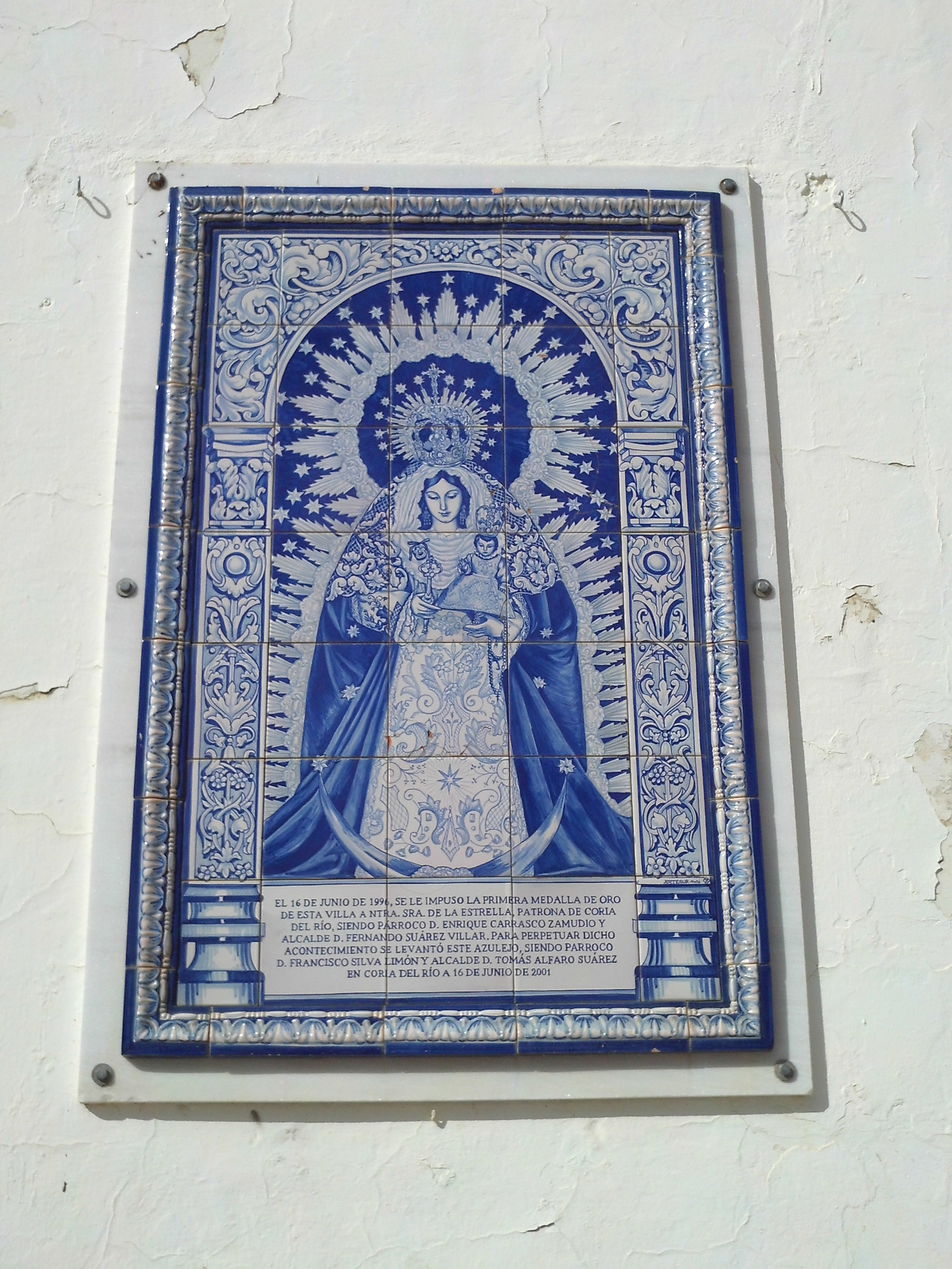 Azulejo de la Virgen de la Estrella. Coria del Río, provincia de Sevilla, Andalucía, España.